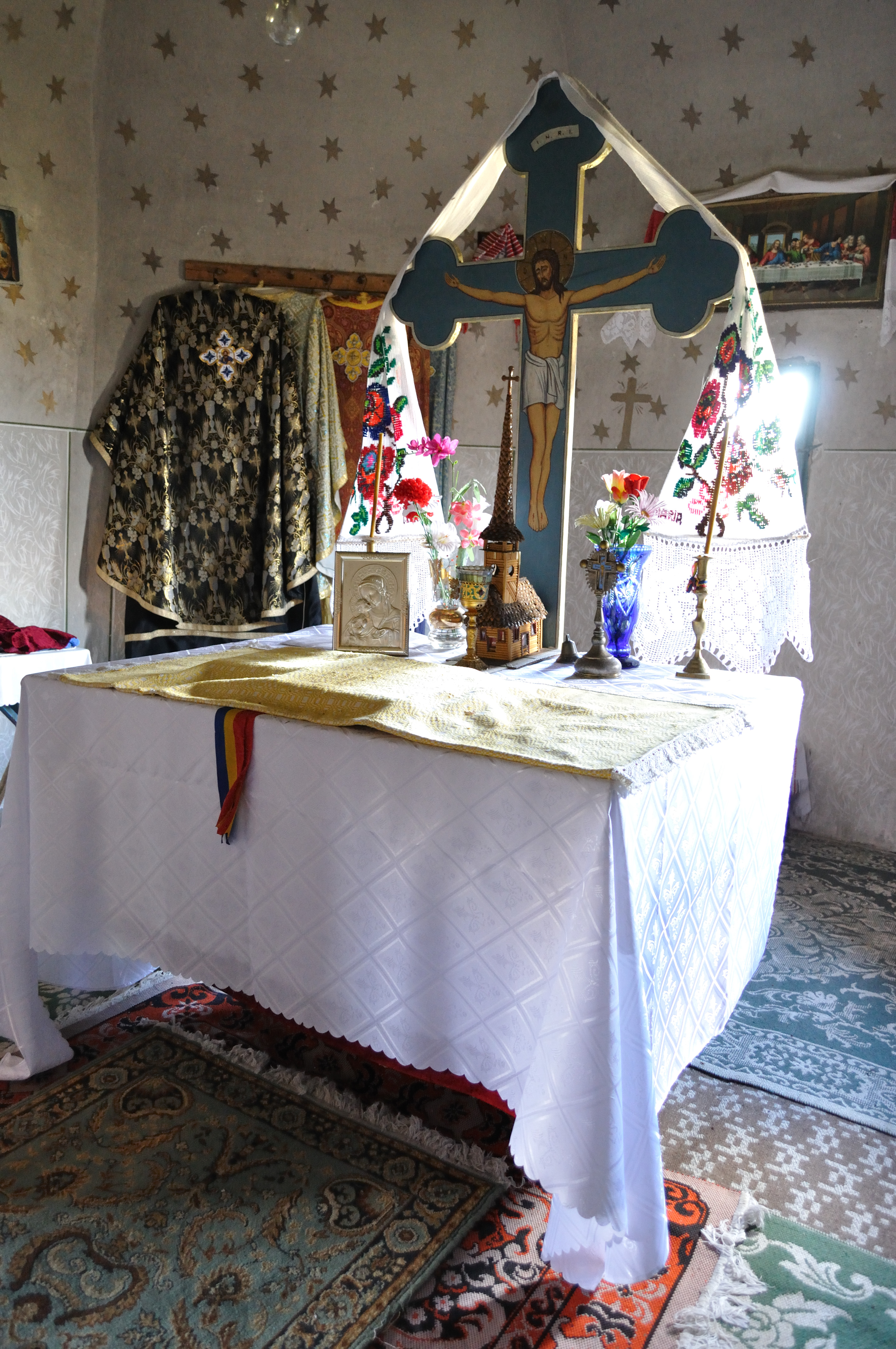 Biserica de lemn „Sfântul Nicolae” din Bădeni, județul Cluj